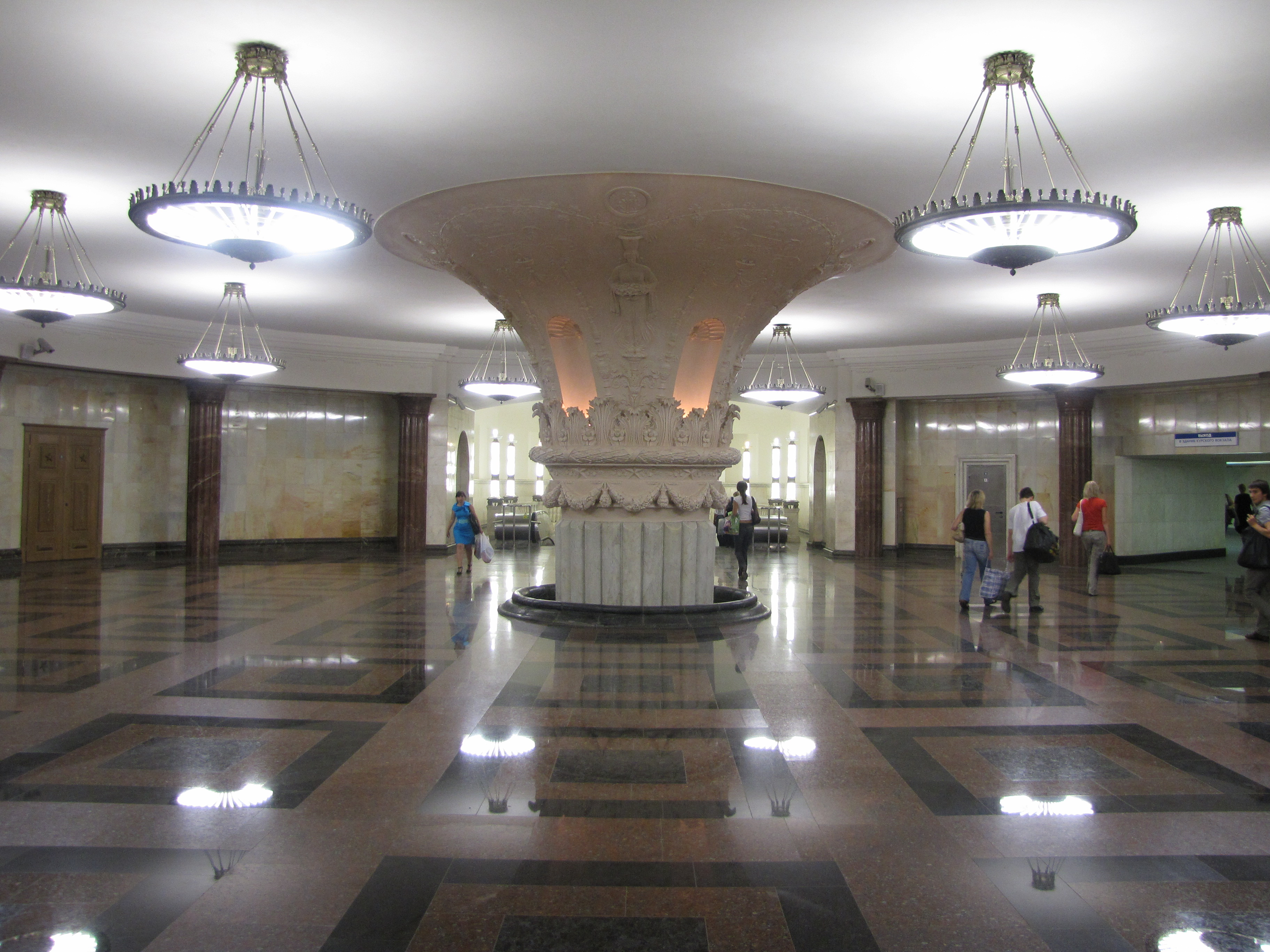 не имеющая себе равных колонн в мире